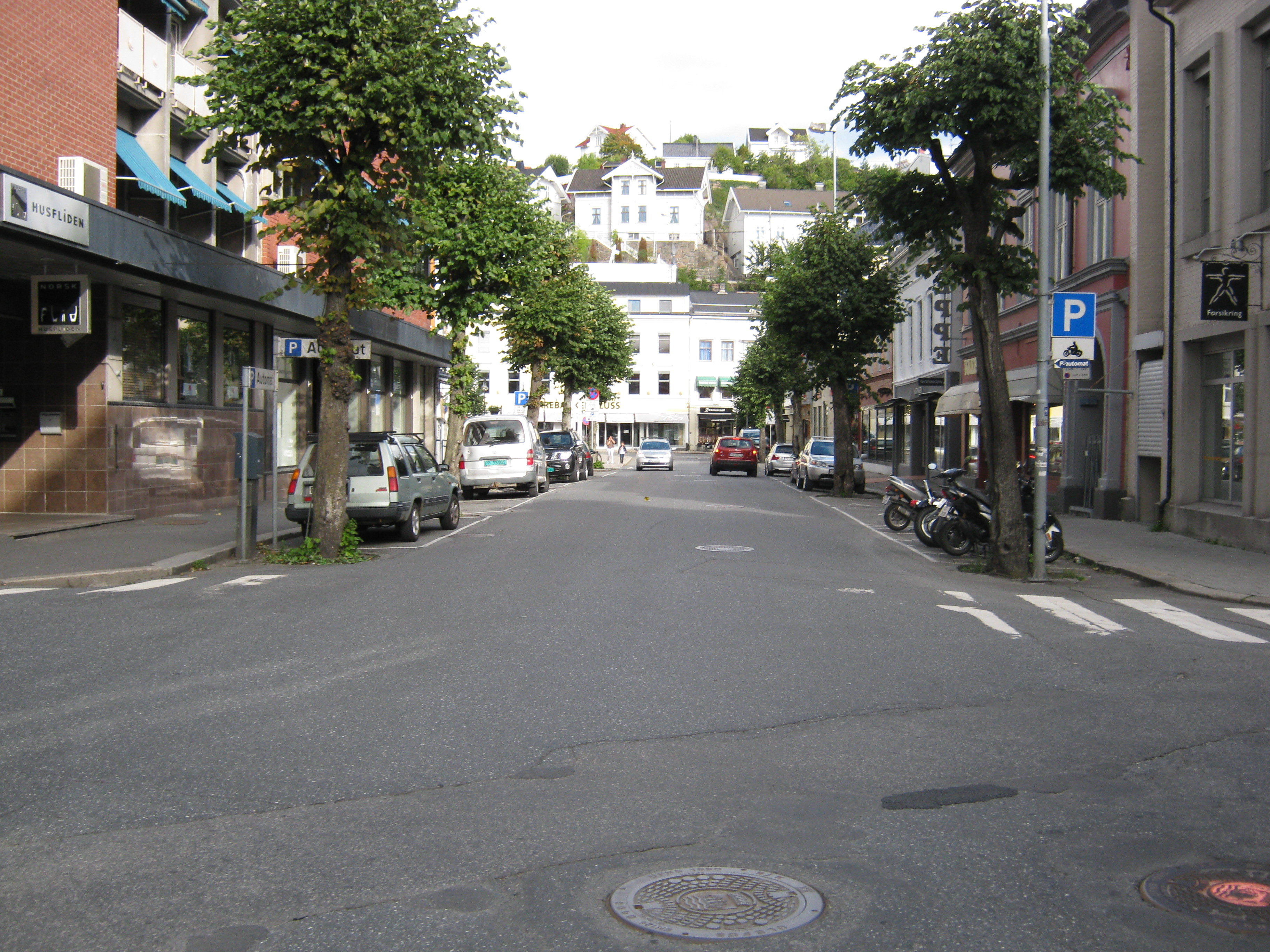 Strandgaten i Arendal